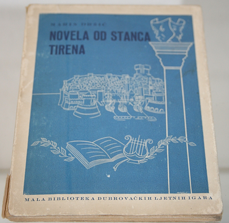 Novela od Stanca